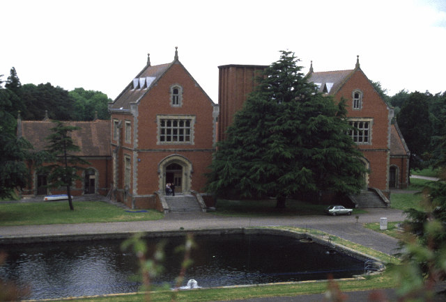 Blagdon Pumping Station